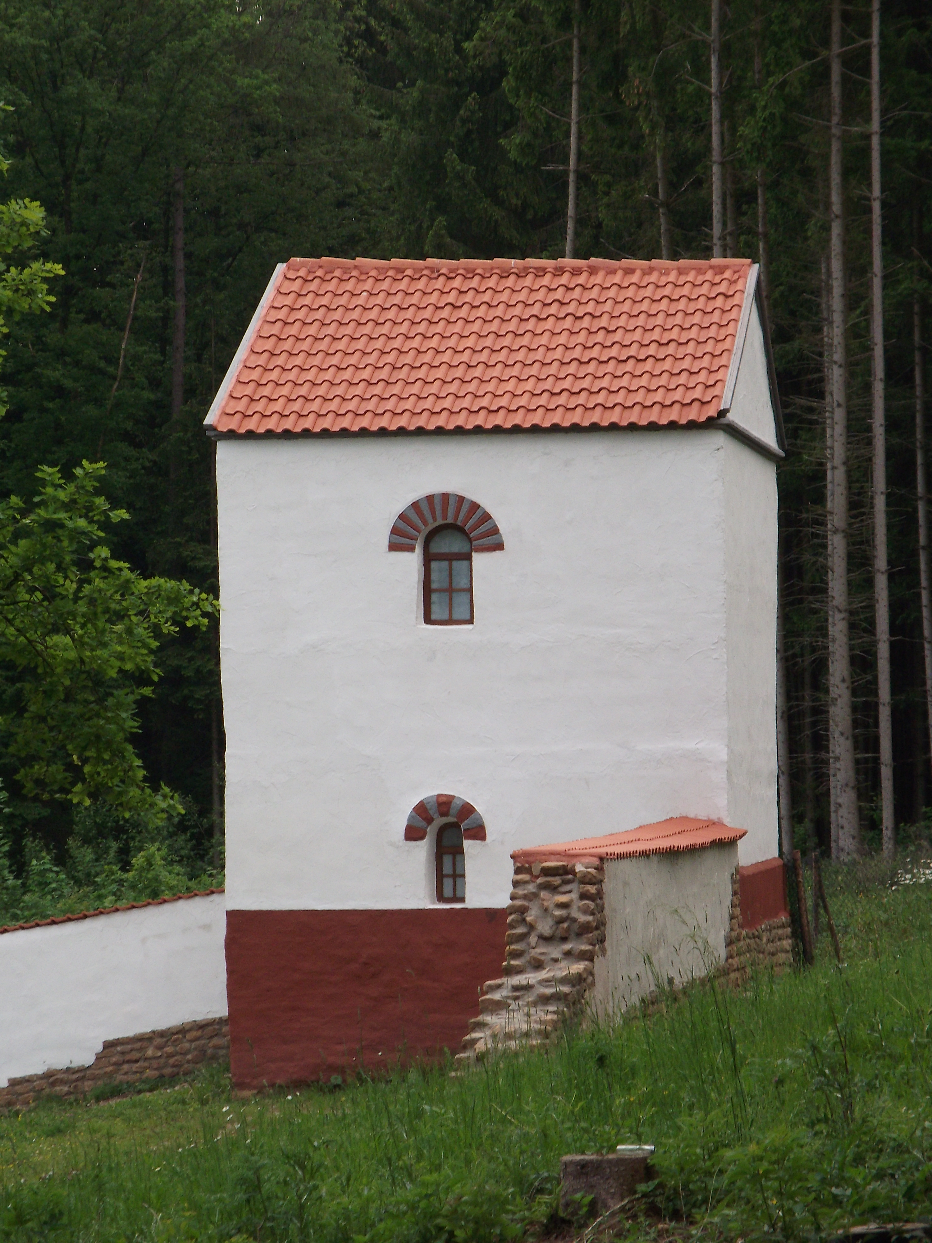 Nordwestturm des Römisches Freilichtmuseum Hechingen-Stein